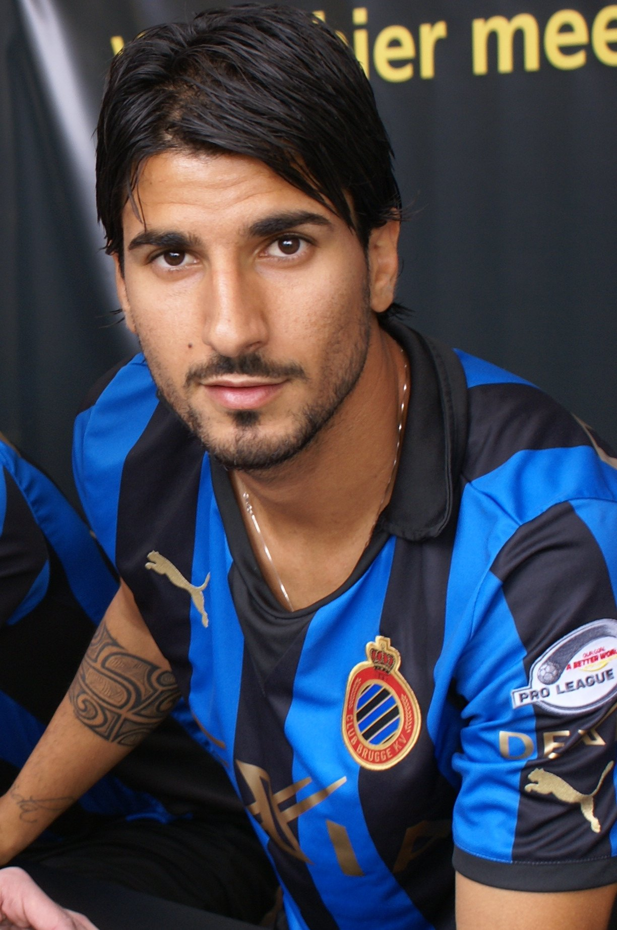 Lior Refaelov (Hebreeuws: ליאור רפאלוב; Or Akiva, 26 april 1986) is een Israëlische voetballer. Foto van Lior Refaelov, nieuwe voetballer van Club Brugge